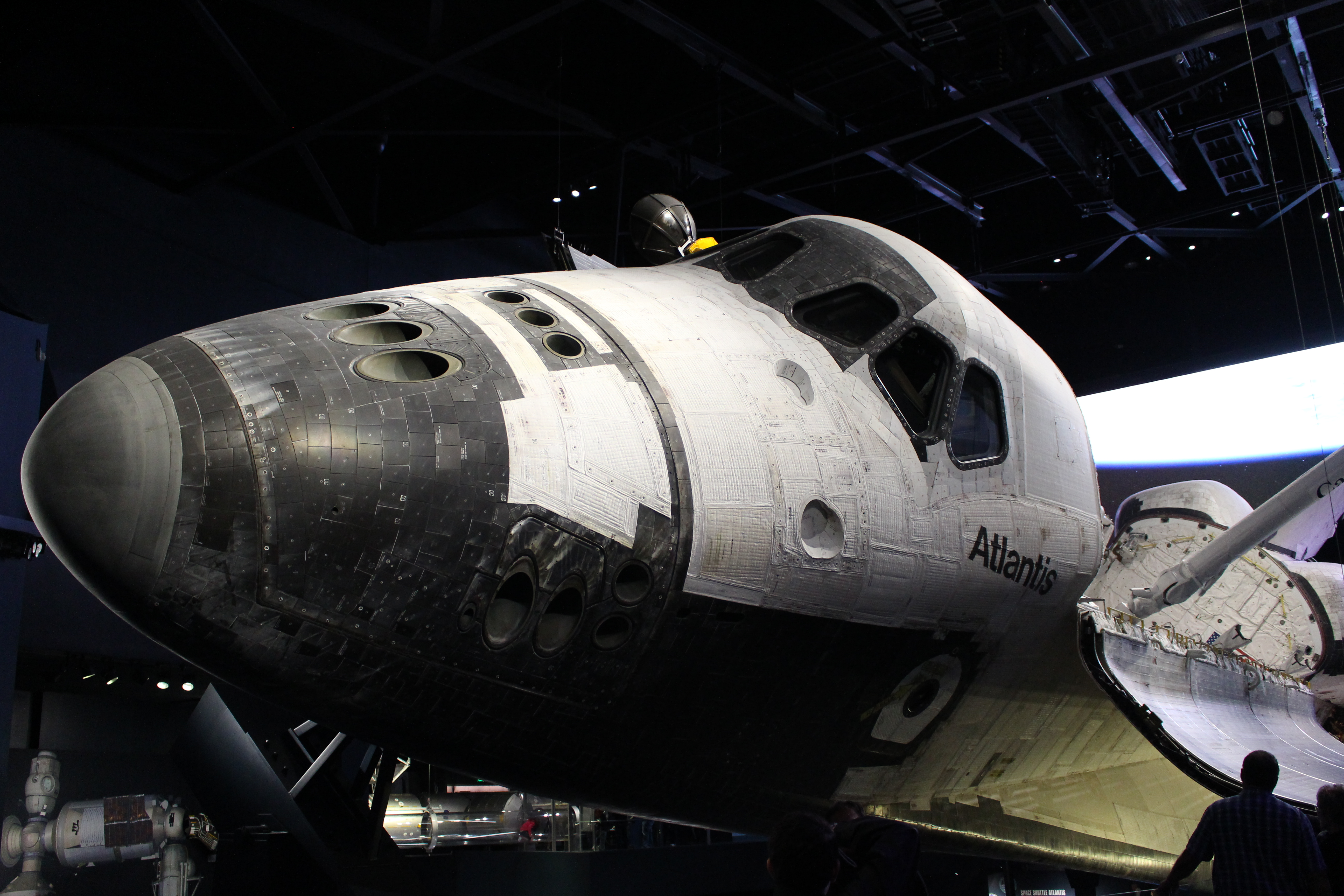 Raumfähre Atlantis in der Ausstellung des Kennedy Space Center Visitor Complex